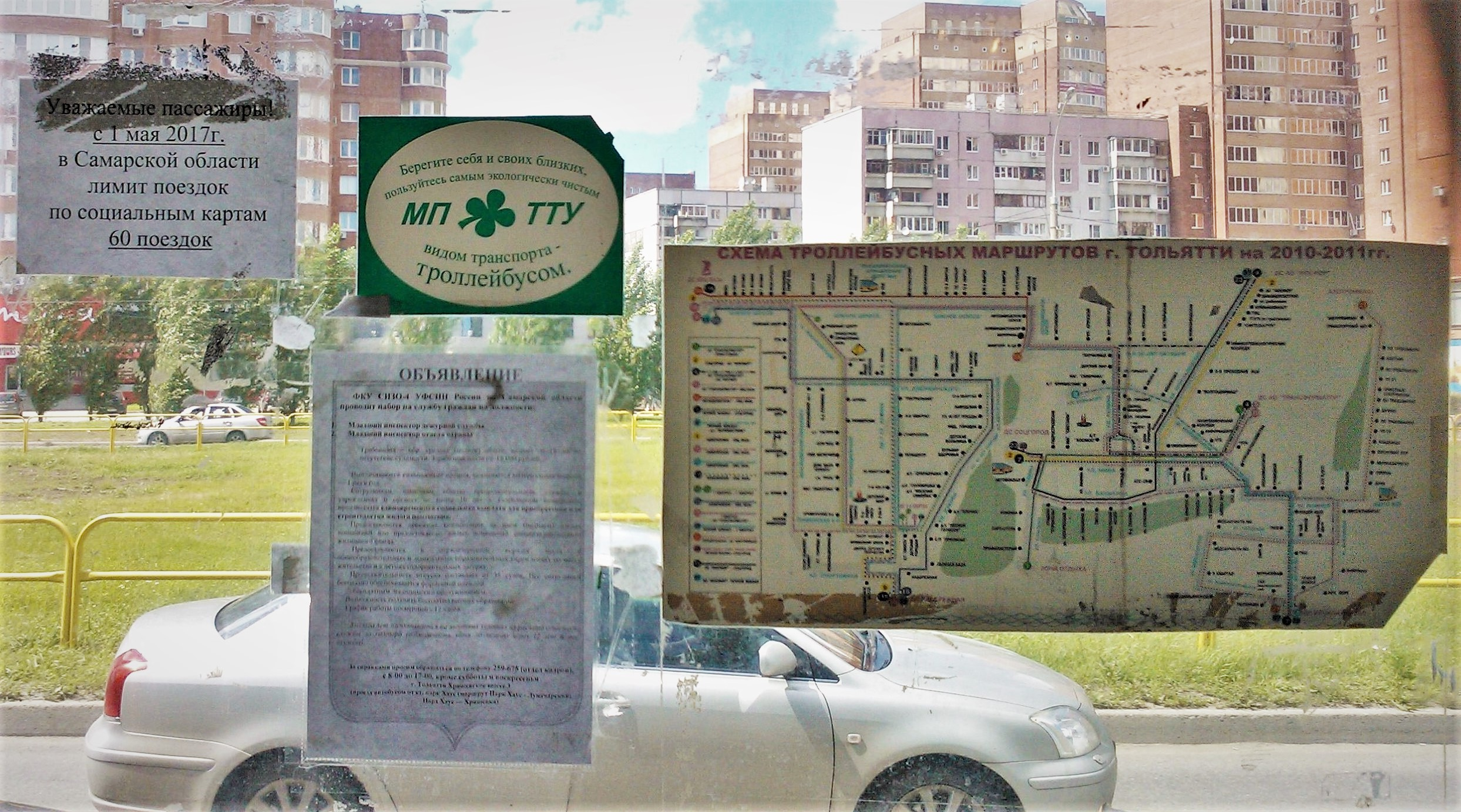 Схема маршрутов и агитационная наклейка в салоне одного из троллейбусов ЗиУ.